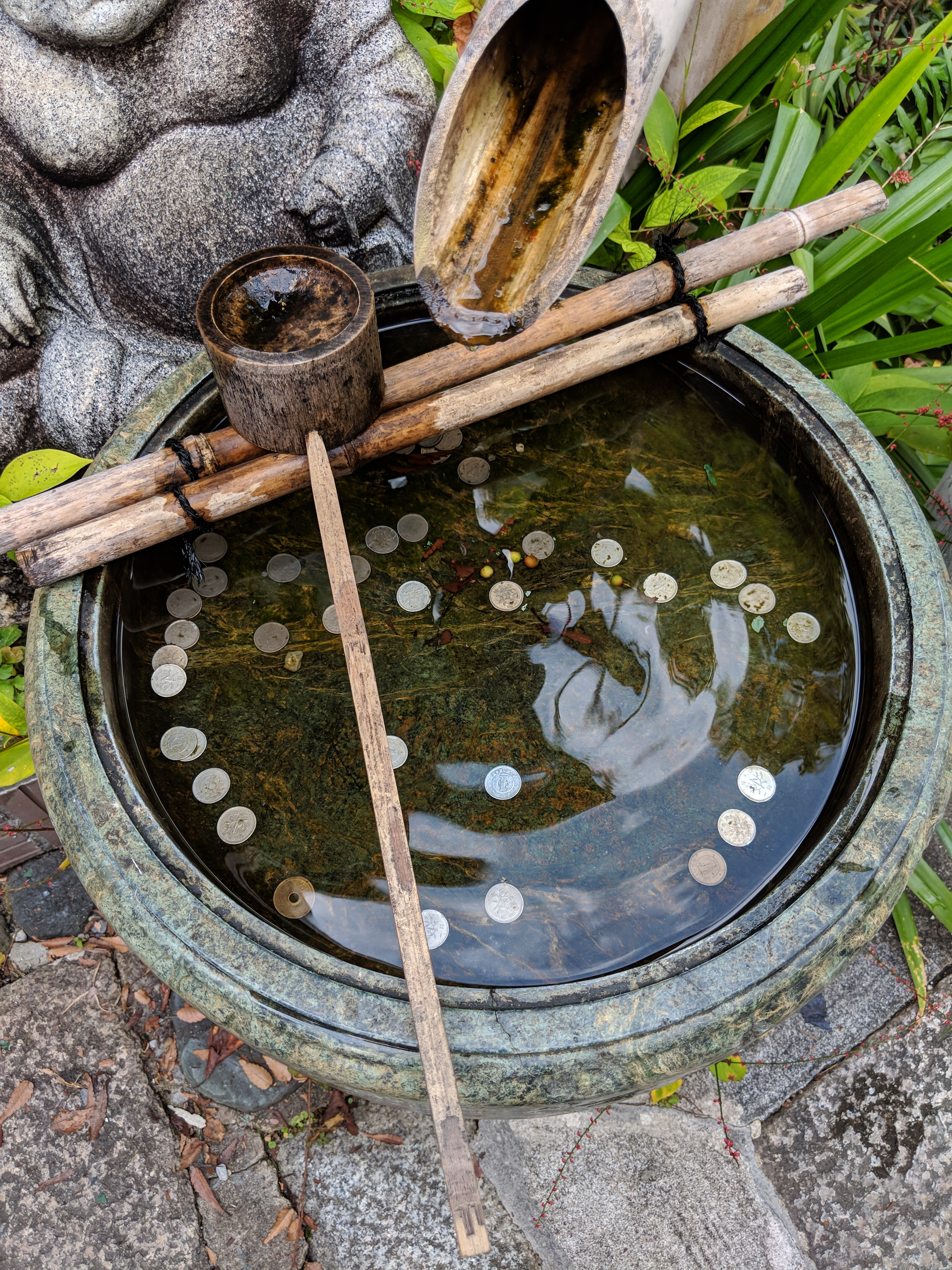 Japan Trip 2018 1023